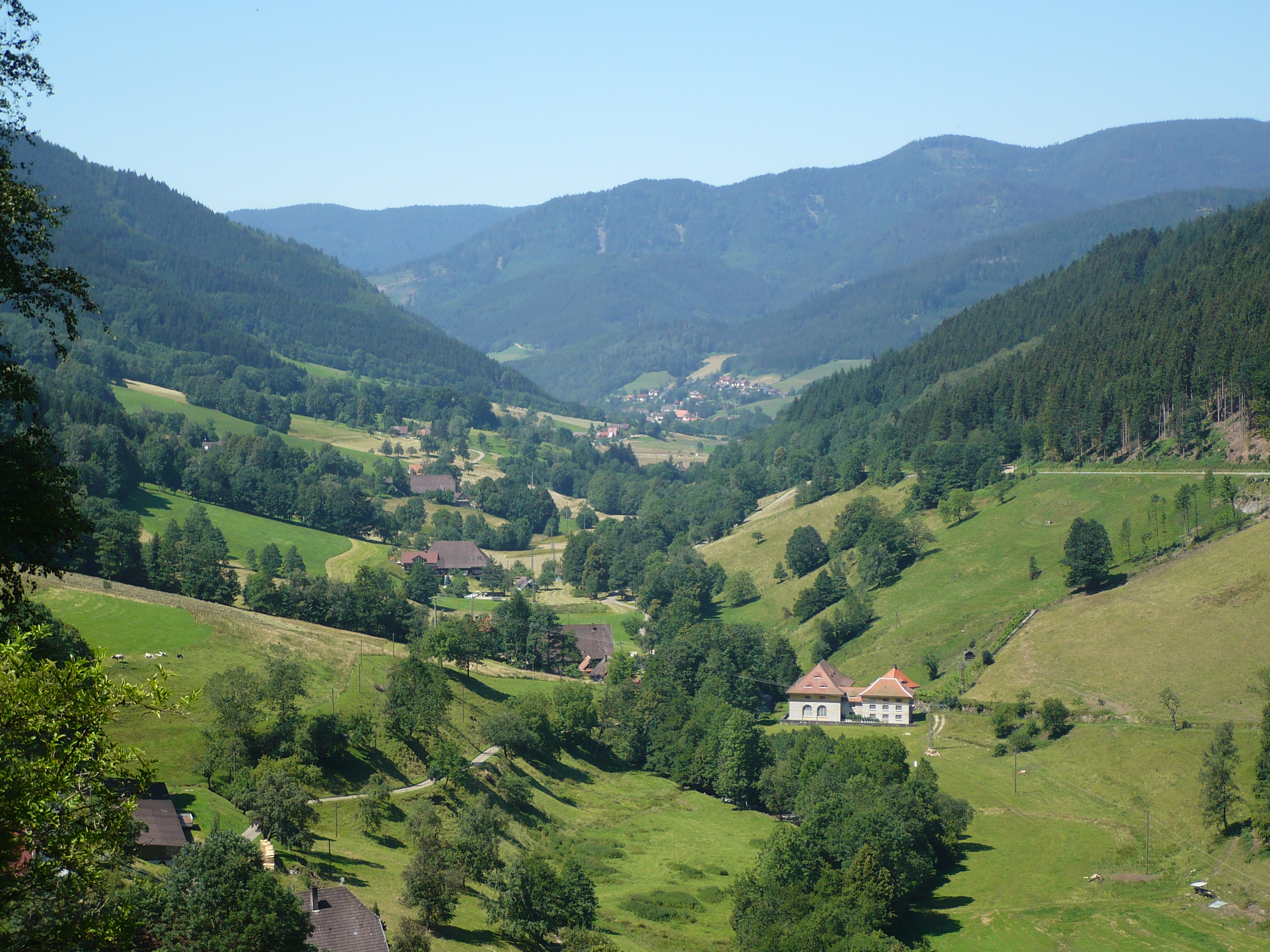 Blick auf das Simonswälder Tal nach Westen, im Vordergrund rechts das Zweribachwerk